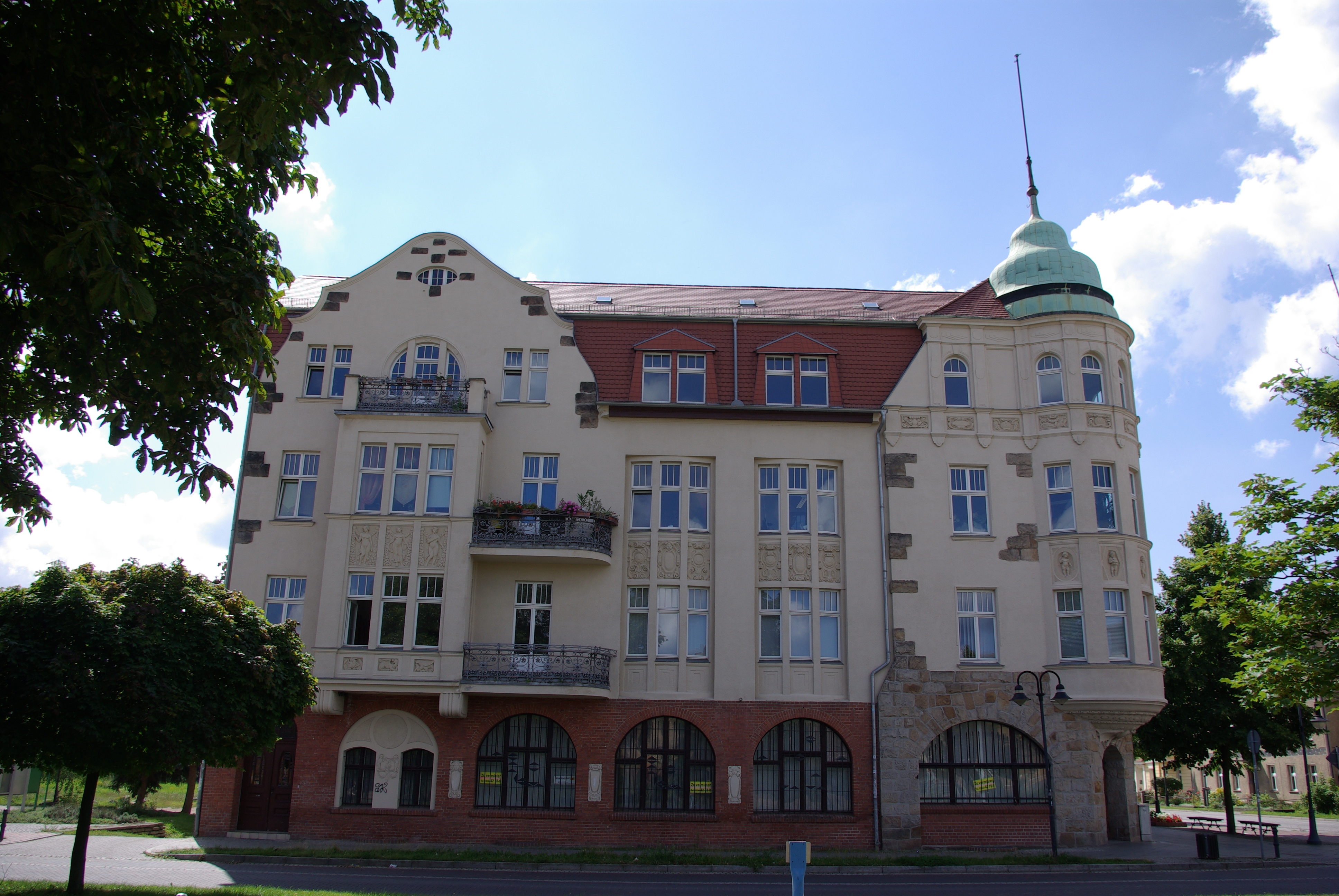 Bad Freienwalde in Brandenburg. Das Haus Bahnhofsstraße 24 steht unter Denkmalschutz. Standort ist vor dem Bahnhof nicht in der Bahnhofsstraße (siehe georef).